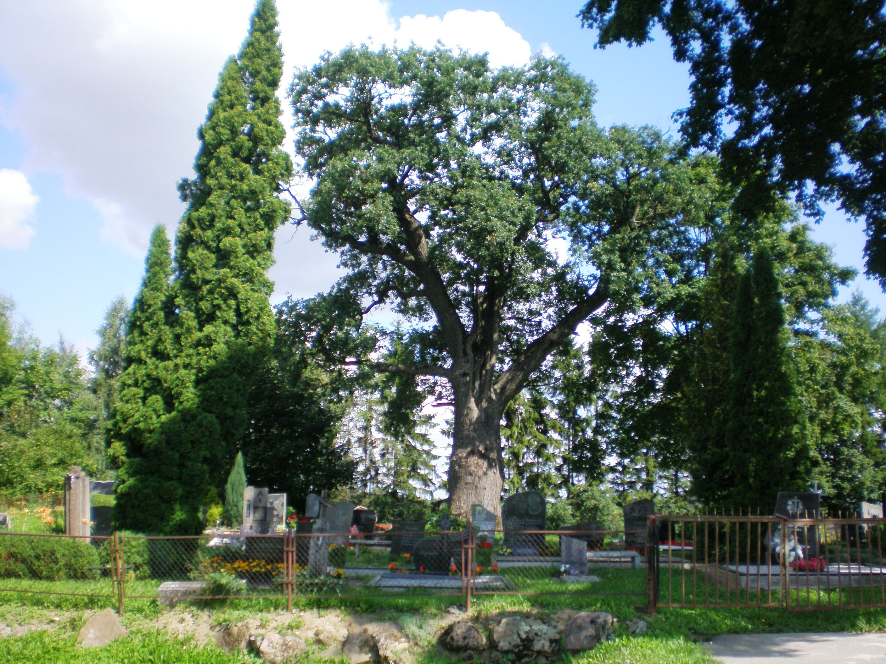 Grinių kapinaitės, Kėdainių raj., Lietuva